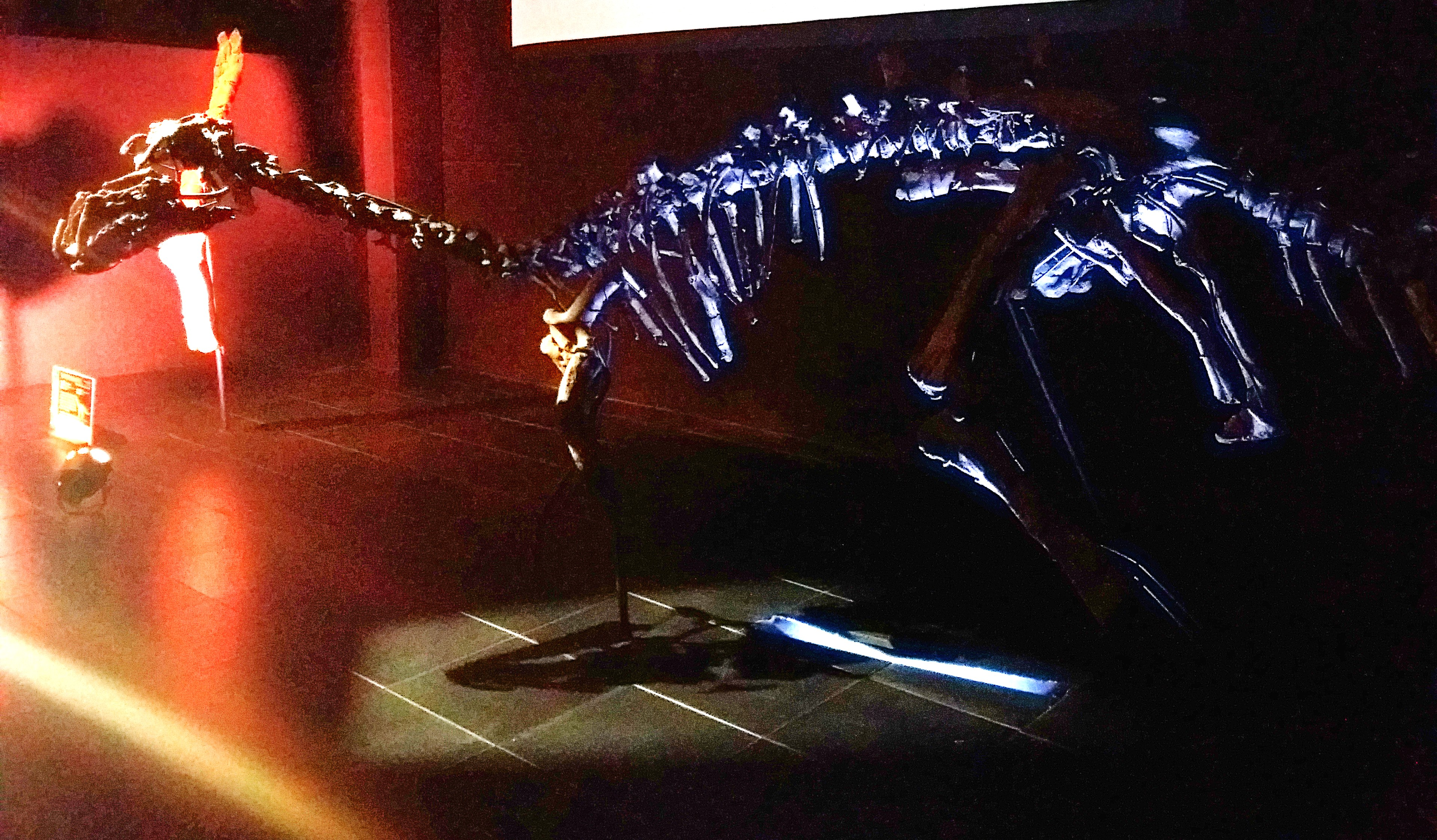 Proa valdearinnoensis. Cretácico. Mina Santa María (SAMCA), Ariño (Teruel). Fósiles y réplicas de fósiles expuestos en Dinopolis (Teruel).